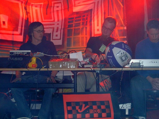 En bild på 047 när de spelade på Klubb Utopi i Skövde